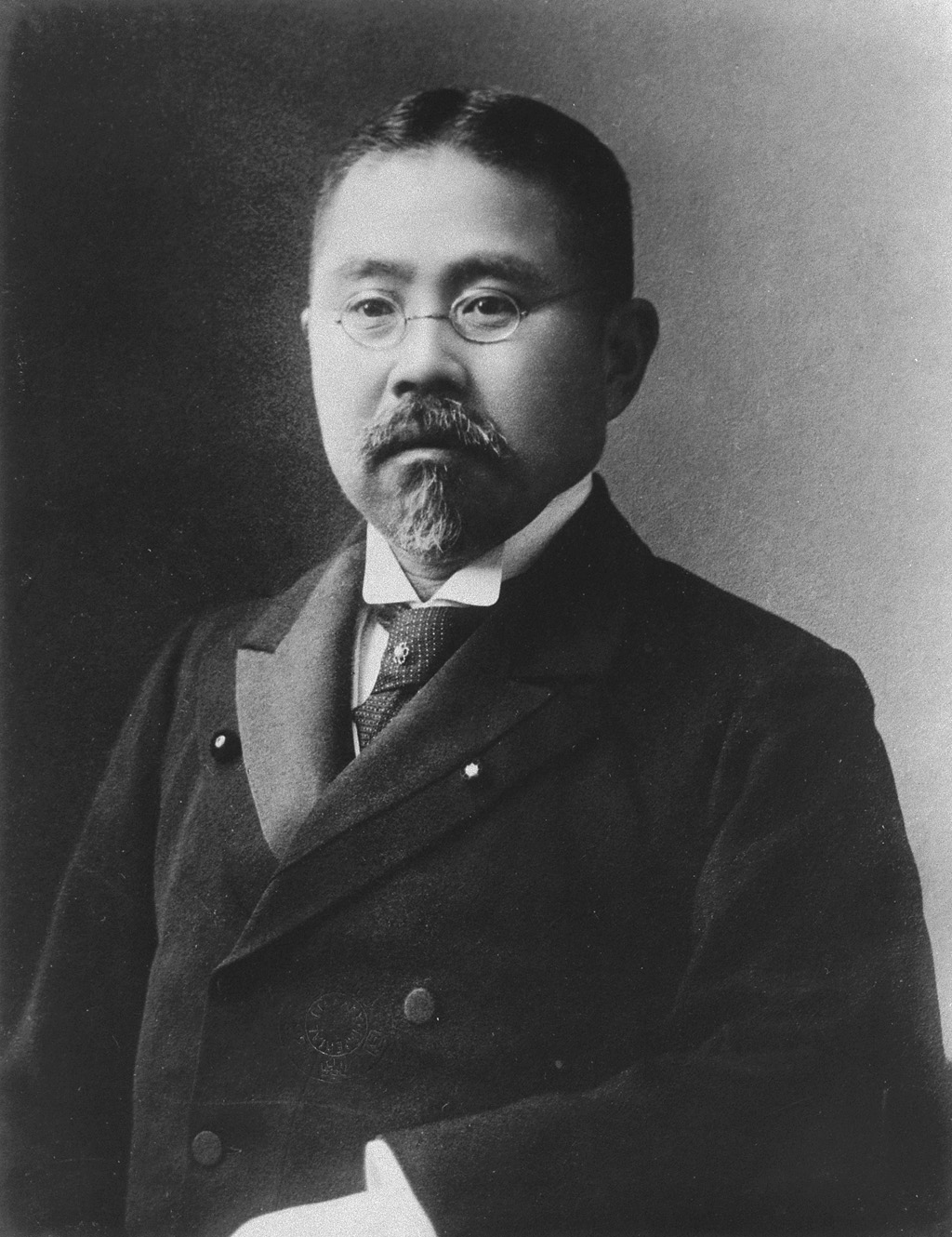 Portrait of Kikuchi Dairoku (菊池大麓, 1855 – 1917)